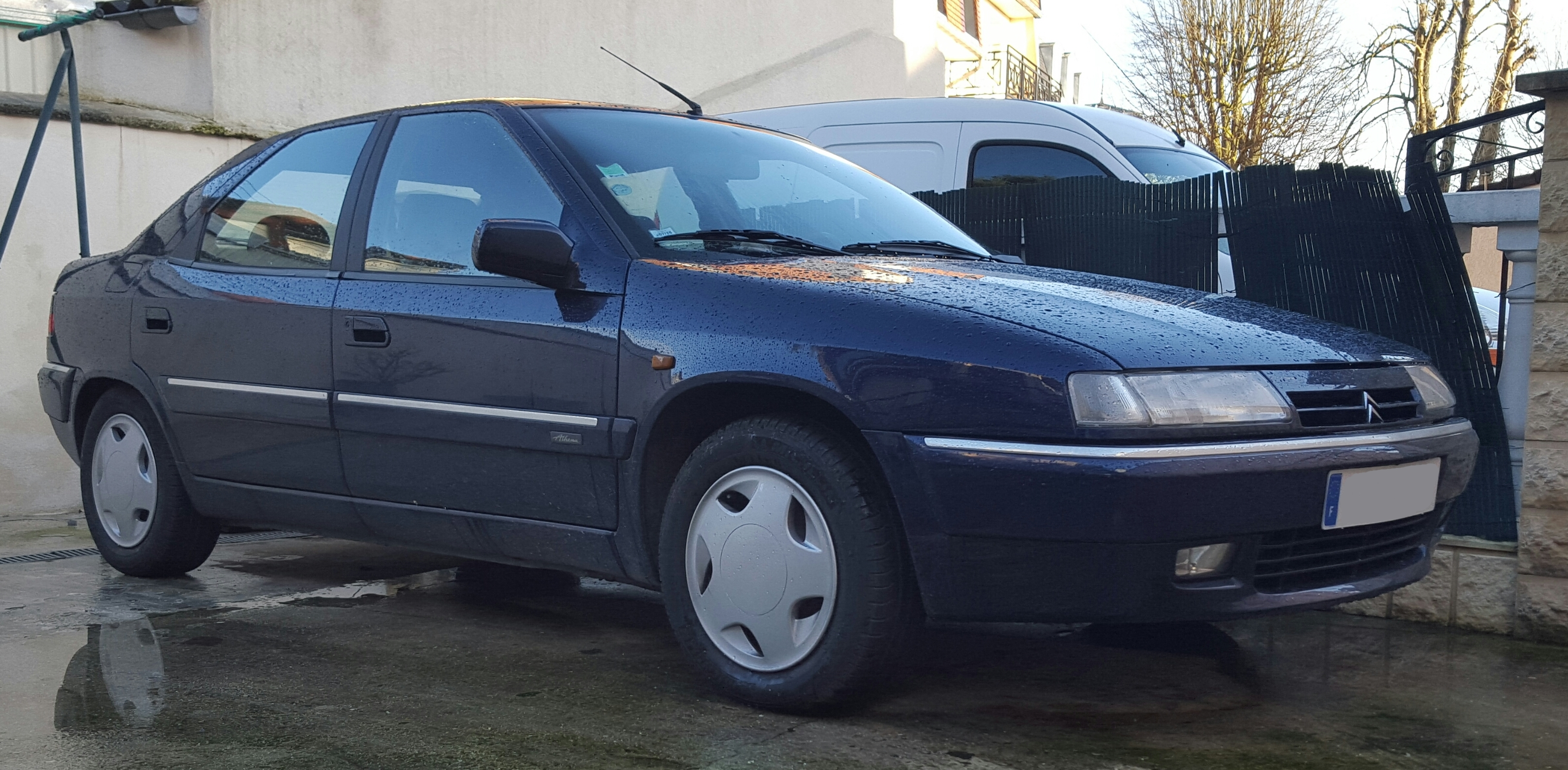 Xantia 2.1 TD de 1997